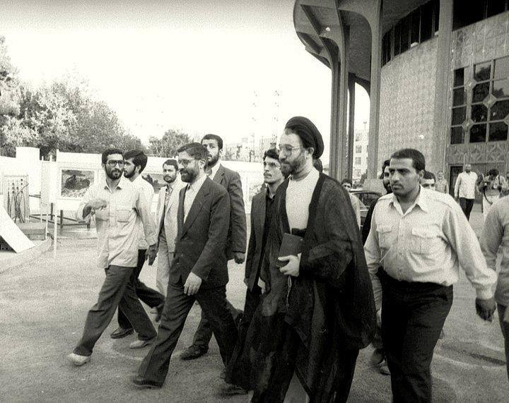 میرحسین موسوی و محمد خاتمی - 1364